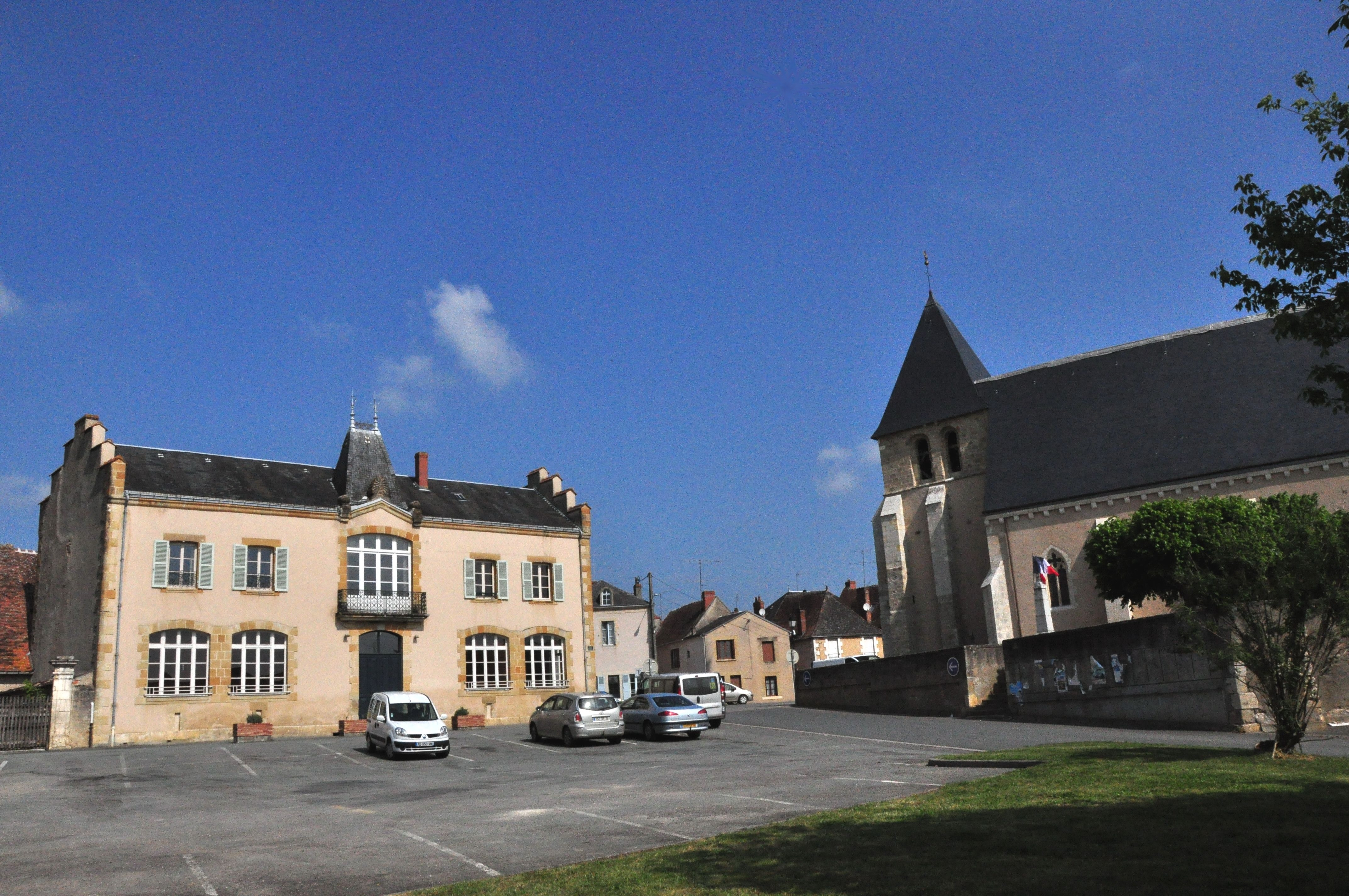 Prissac (Indre) - Place du 8 Mai